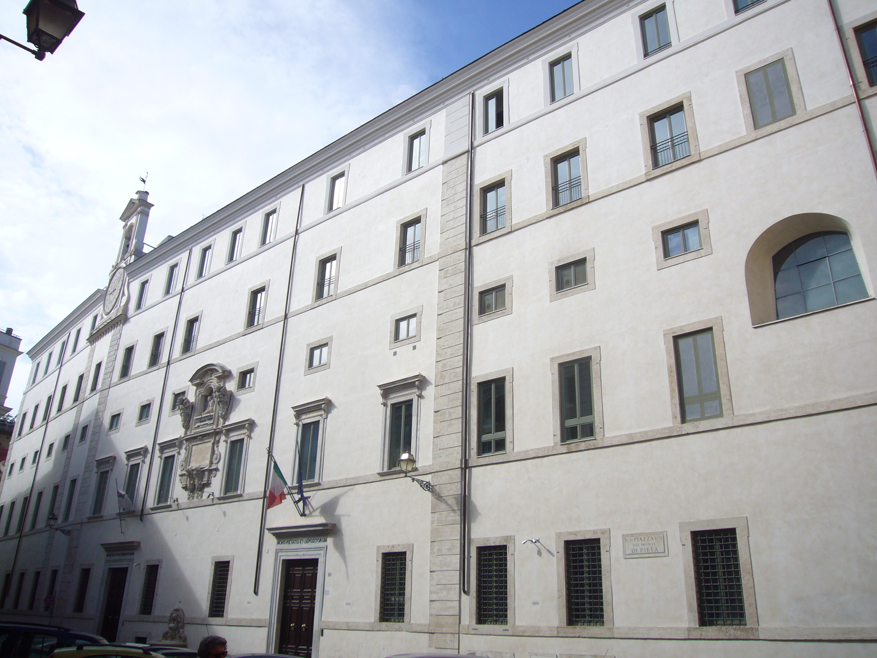 Roma, palazzo del Monte di Pietà (restauro 2012)